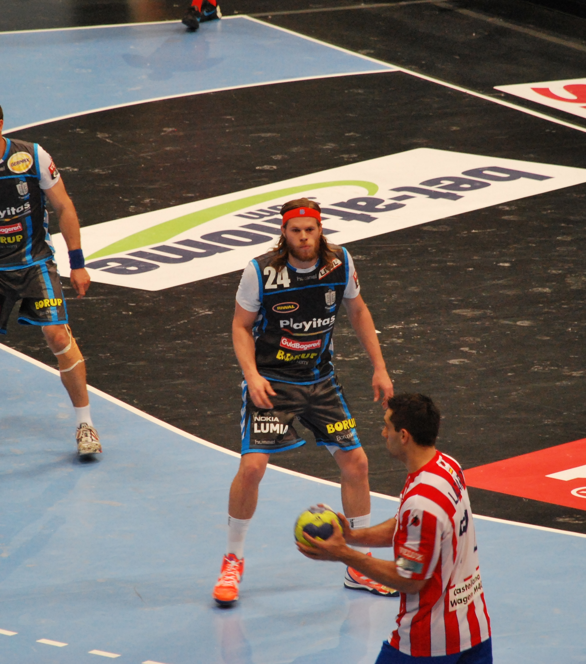 Mikkel Hansen beim Final Four 2012 gegen BM Atlético de Madrid